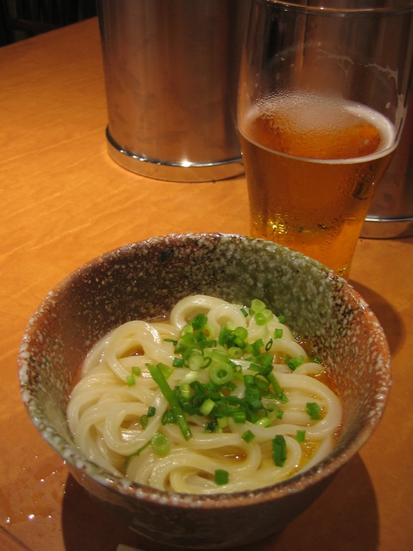 @jabukama, shibuyakamatama udon